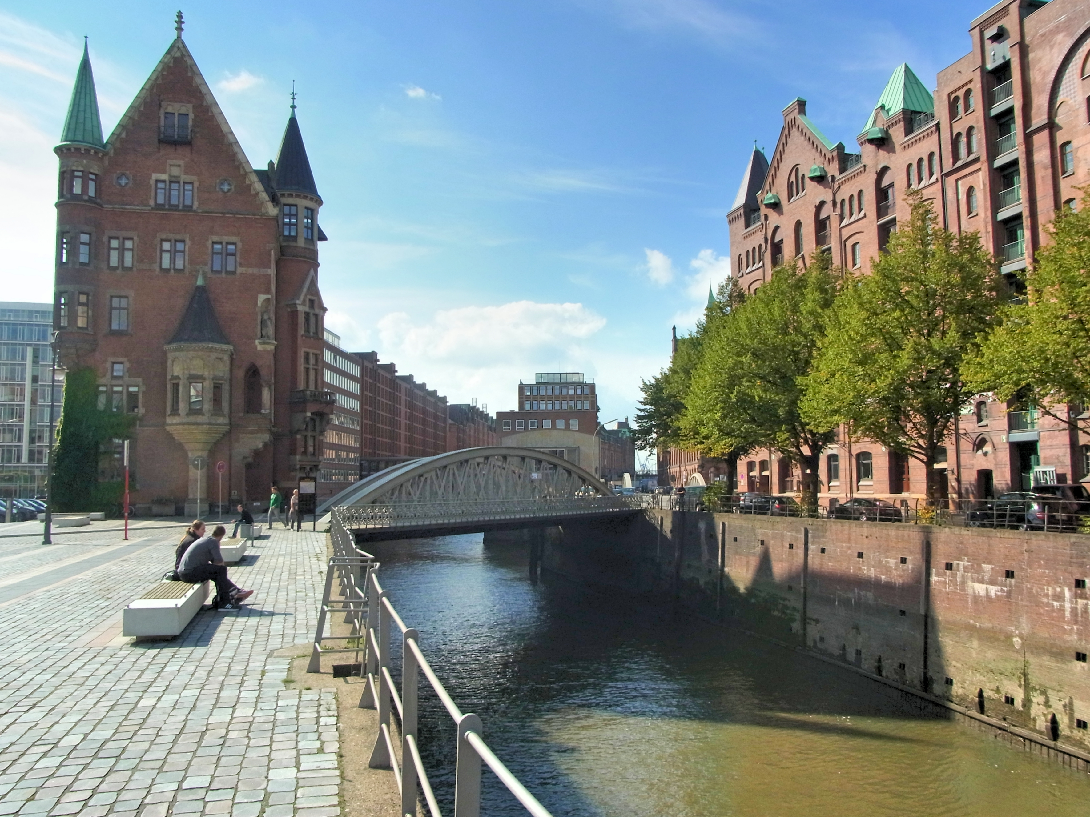 Die Neuerwegsbrücke führt über das St. Annenfleet und wurde 1886 errichtet. Direkt daneben das erste Verwaltungsgebäude der damaligen Hafenbehörde.This is a photograph of an architectural monument.